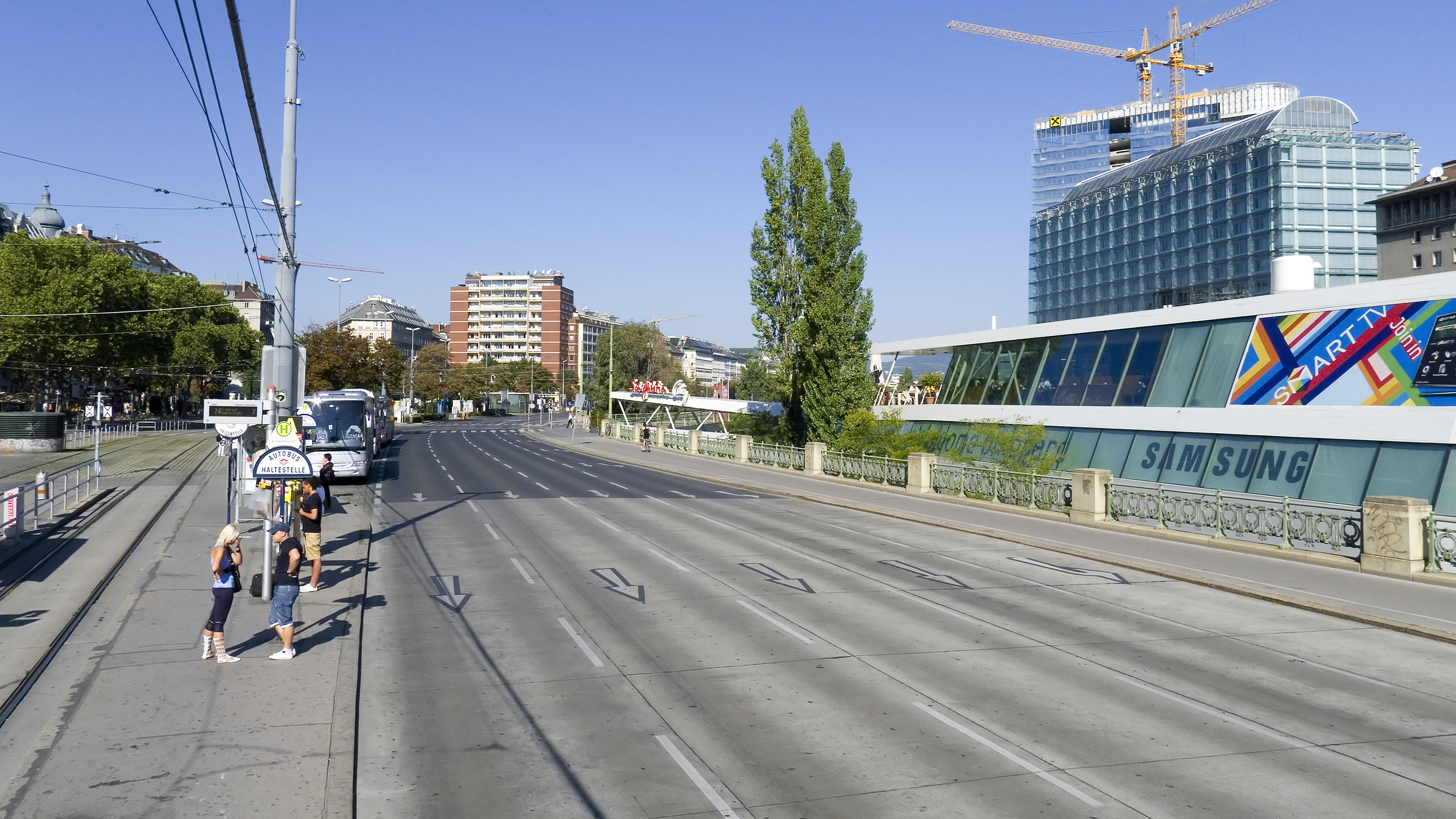 Franz-Josefs-Kai in Wien 1 bei Nr. 13 Richtung Nordwesten